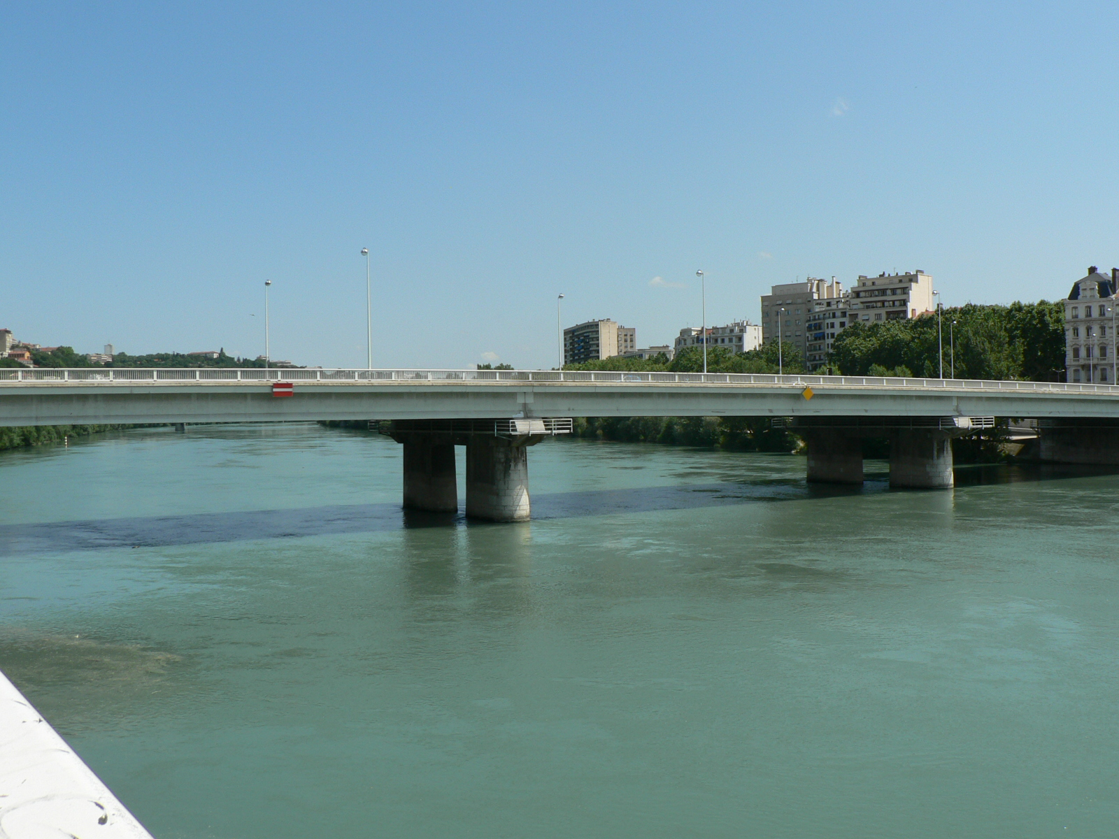 Ponts de Lyon – Pont de Lattre de Tassigny